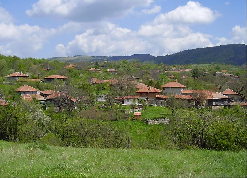 Село Кладни дял - панорама